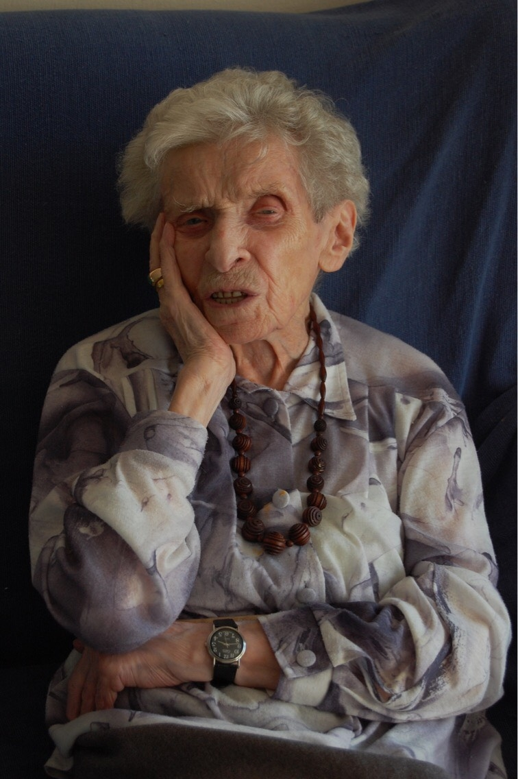 Wanda Wierzchleyska (ur. 3 stycznia 1900, zm. 14 stycznia 2012), córka lekarza Eugeniusza Wajgiela (1873–1944) i Ludwiki z Jankowskich, absolwentka Wydziału Rolnego Politechniki Lwowskiej, przez ostatnie 2 lata życia była najstarszą żyjącą Polka. Zdjęcie zrobione we wrześniu 2008, gdy miała ona 108 lat.